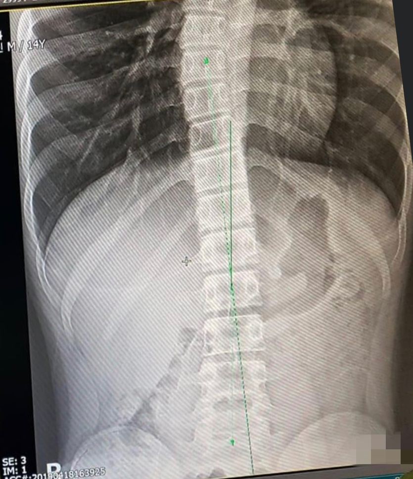 누워있을 때의 척추이다. 누워 있으면 척추는 중력 영향을 받지 않는다.